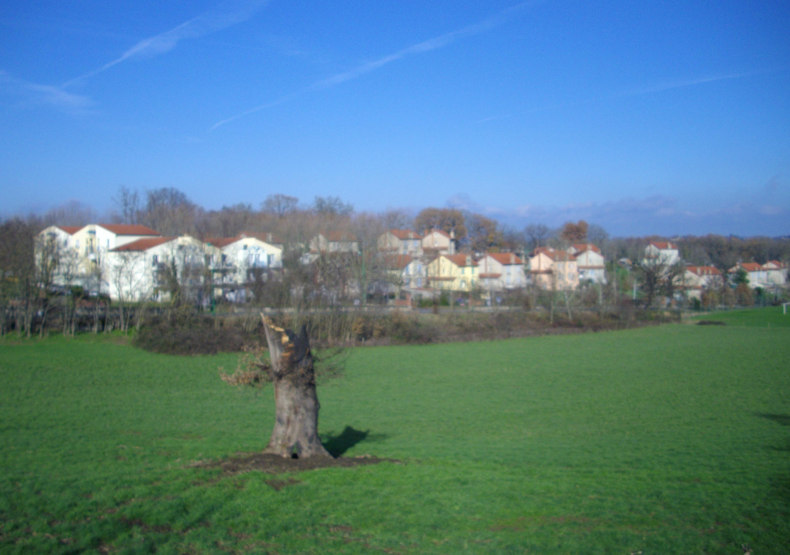 Vue générale de la Cité de Fontgrande (Saint-Benoît-de-Carmaux)